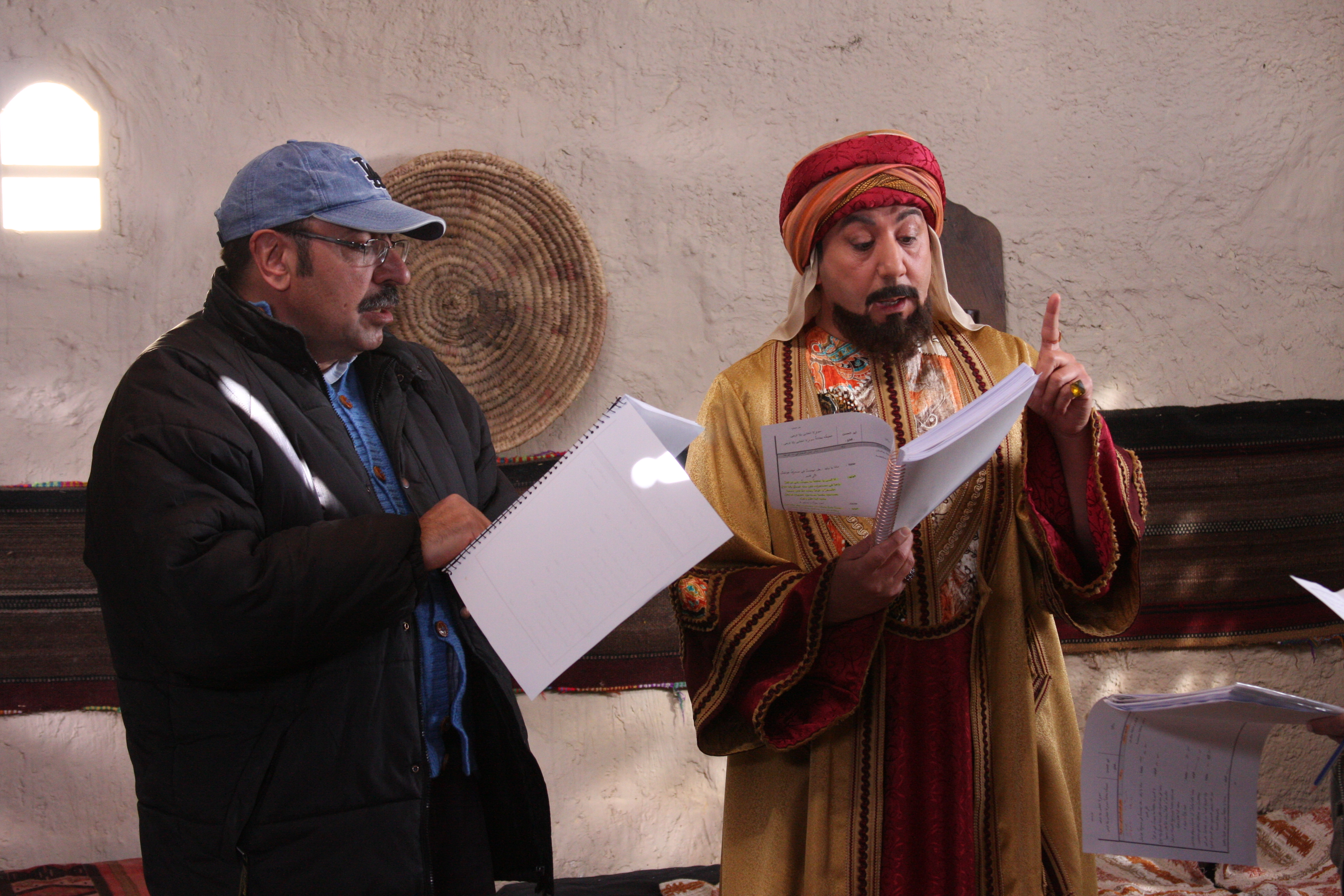 مخرج في التلفزيون